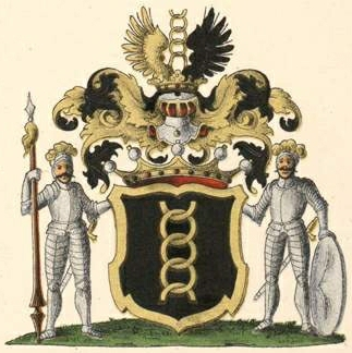 Schlippenbachi suguvõsa (Pornuse liin) vabahärravapp